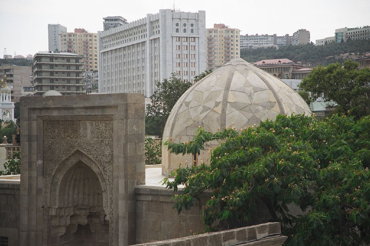 Baku, Azerbaijan